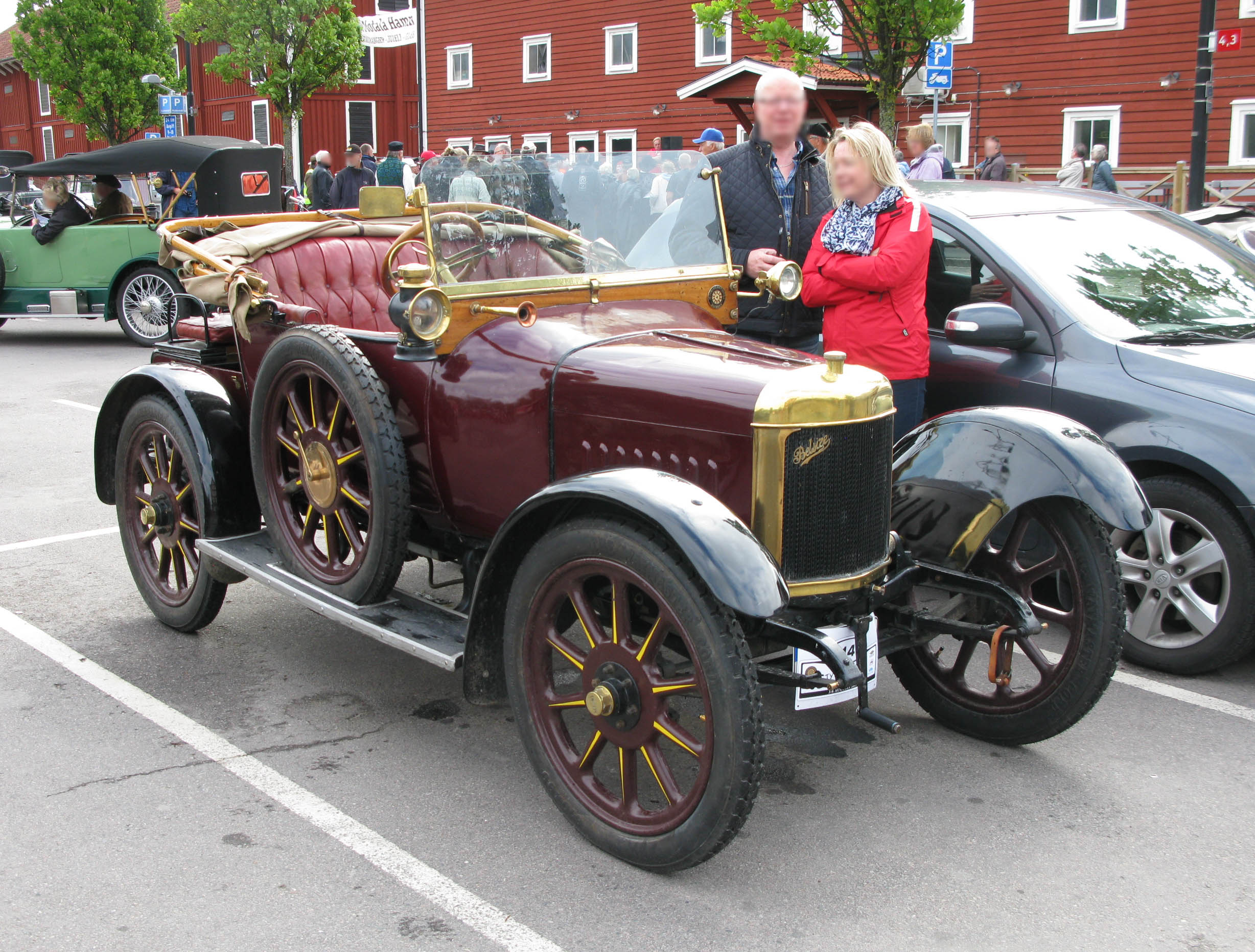 Belsize 10 - 12 HP 1912